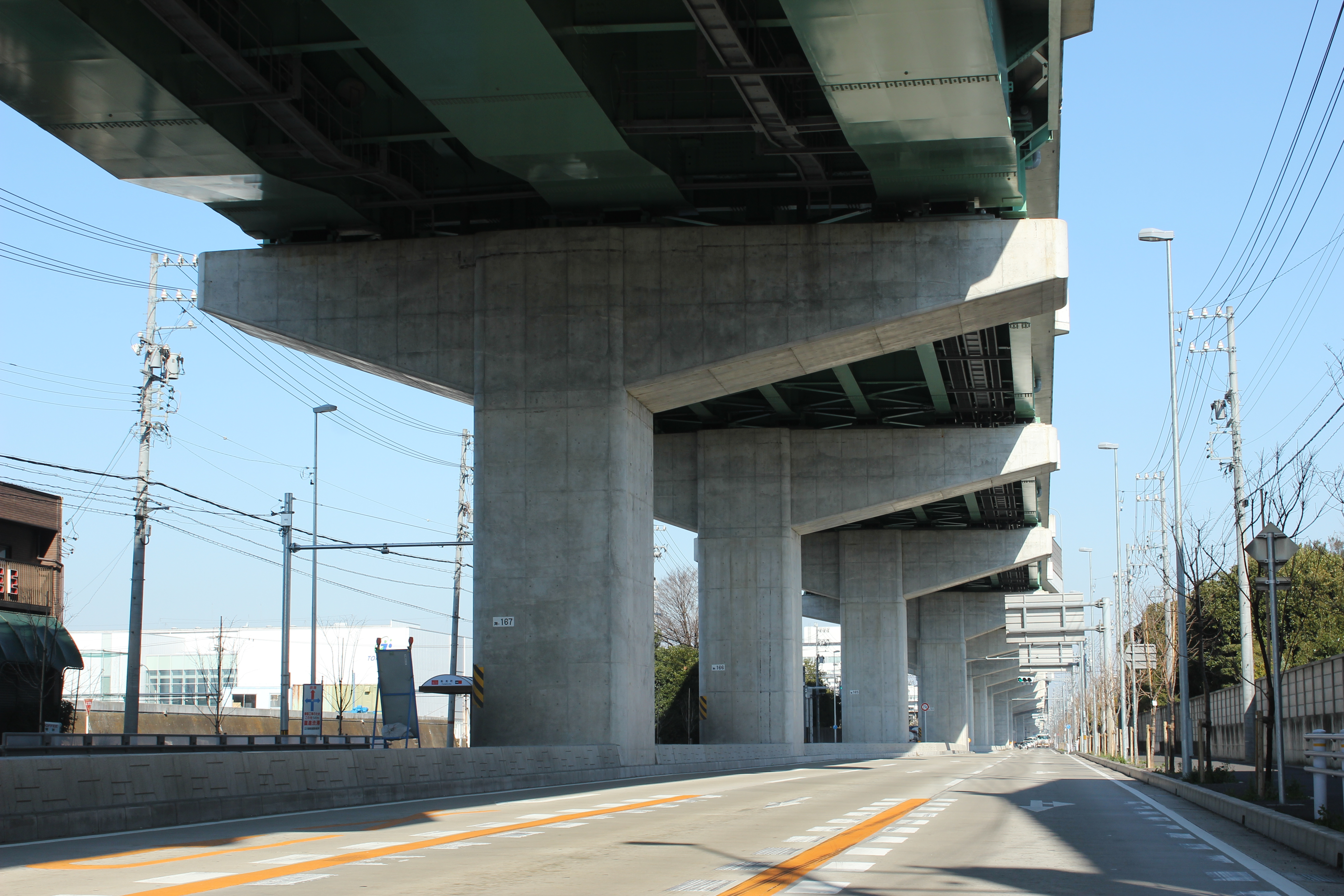 名古屋高速4号東海線 （名古屋市港区）